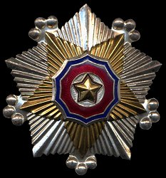 Order of the National Flag - 2st Class